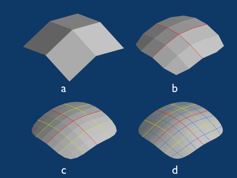 (a) mesh เริ่มต้น (b) subdivide ด้วย algorithm Catmull-Clark ที่ level 1 (c) ที่ level 2 และ (d) ที่ level 3